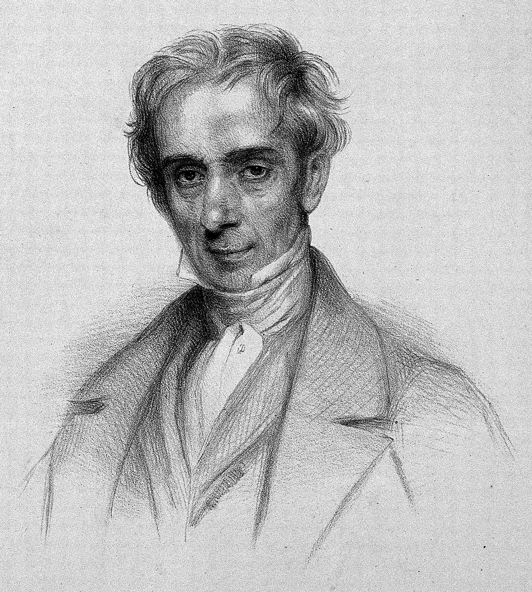 Gioacchino Taddei